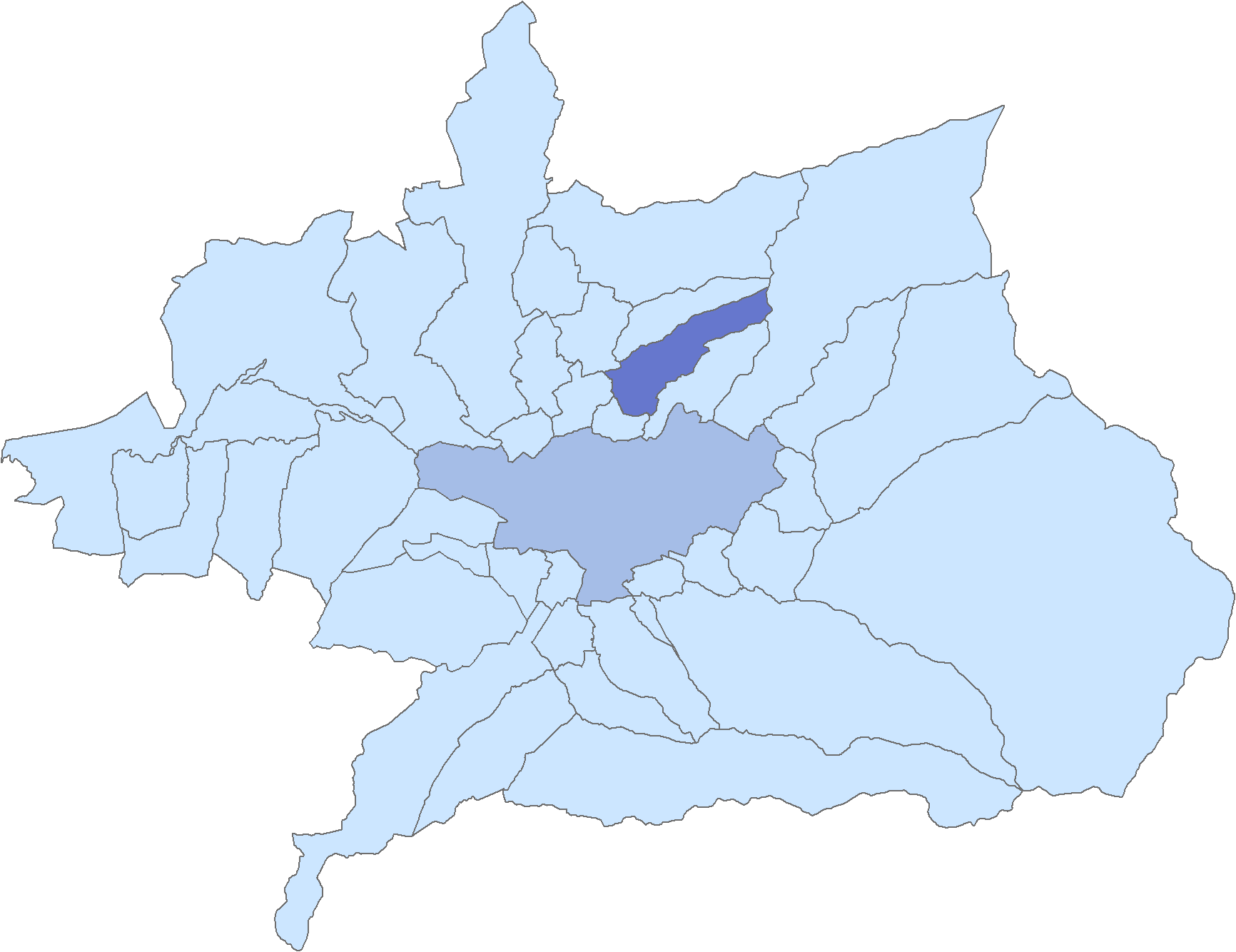 Situación del municipio de Alfacar respecto a la comarca de la Vega de Granada, en España.